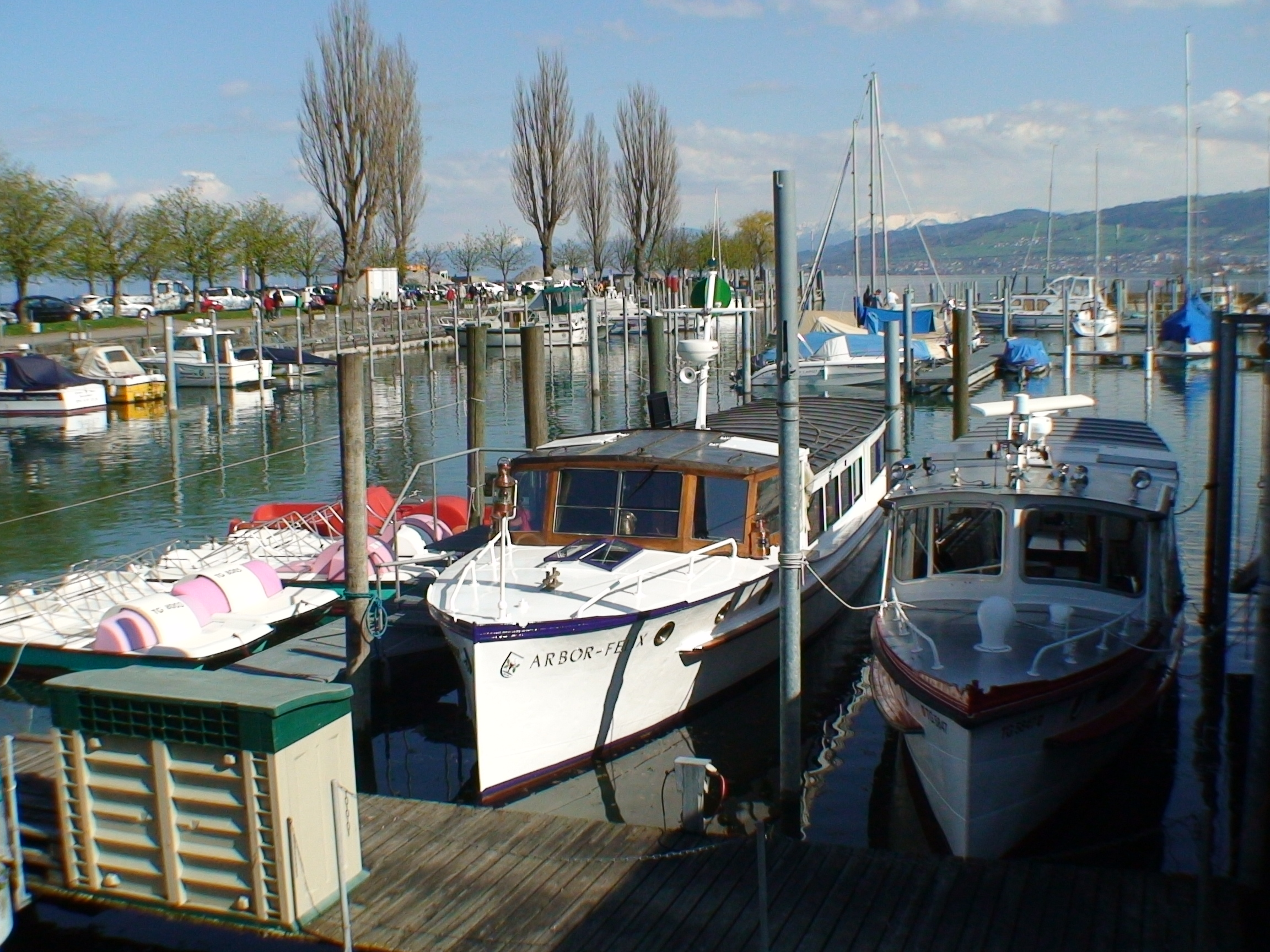 Harbor in Arbon, Hafen Arbon in der Schweiz